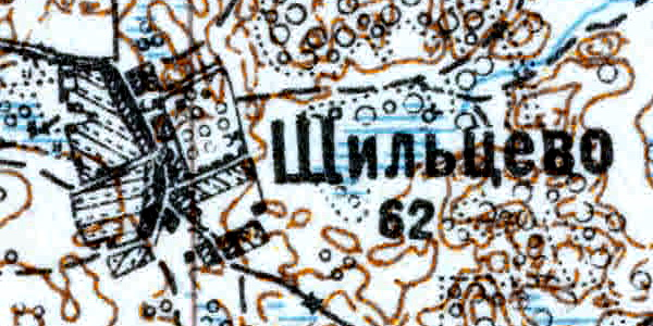 Топографическая карта Ленинградской области, квадрат VIc-28 (Луга), деревня Шильцево